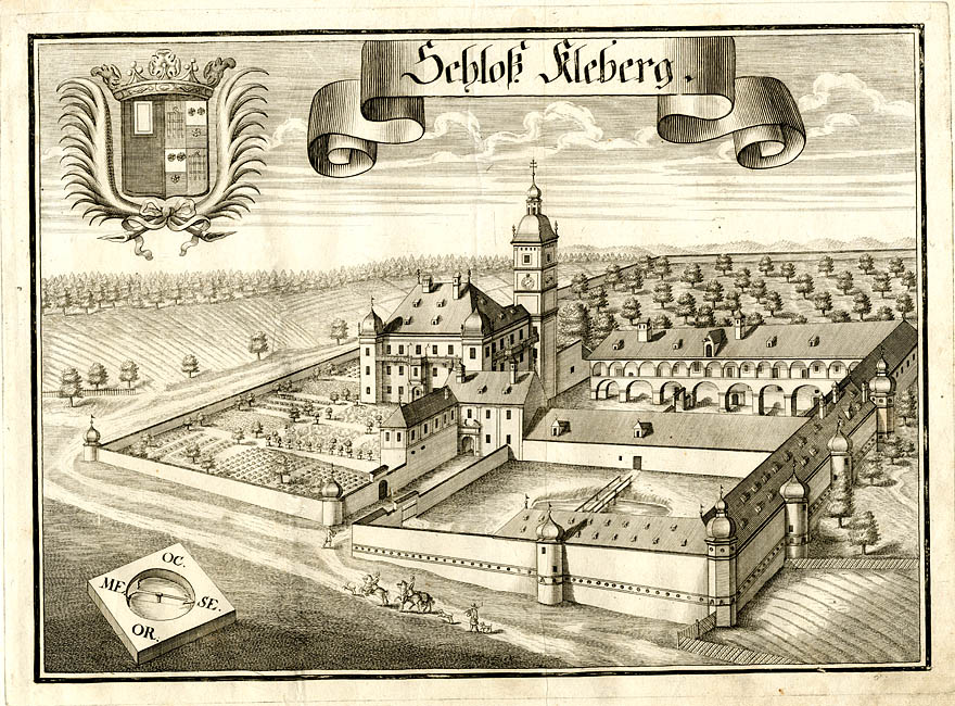 “Schloß Kleberg” (Schloss Kleeberg bei Ruhstorf), aus : Beschreibung des Churfürsten- und Hertzogthumbs Ober- und Nidern Bayrn. – Rentamt Landshut, Gericht Griesbach, 1723